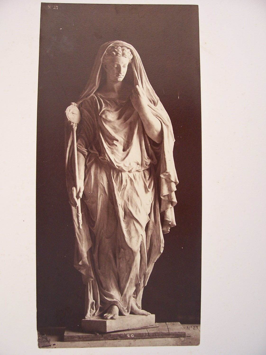 Le Nouvel Opéra de Paris. Statues décoratives (35 planches) Statues dans le Grand Foyer: Planche 27: La Modestie (par Vilain)